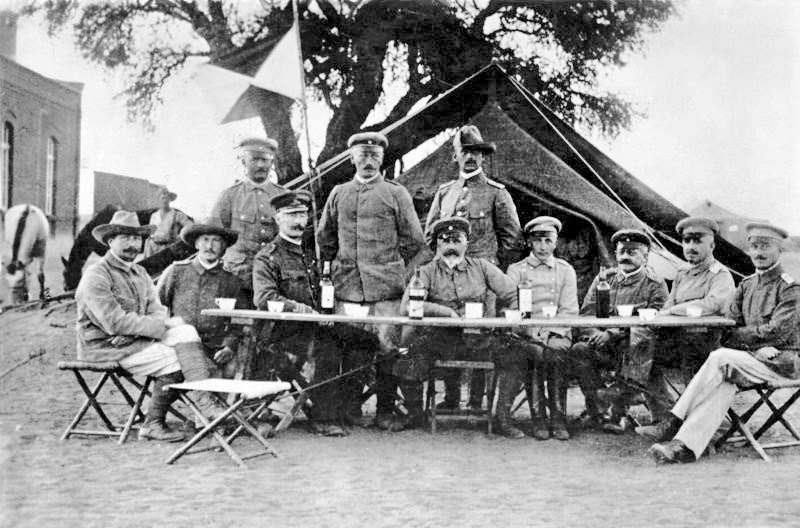 Deutsch-Südwestafrika, Herero-Aufstand Zentralbild Generalleutnant Lothar von Trotha (GND 117636908), der Oberkommandierende der Schutztruppe in Deutsch-Südwestafrika, mit seinem Stabe in Keetmanshoop während des Herero-Aufstandes 1904. 8932-05 Abgebildete Personen: stehend von links: Oberleutnant von Trotha (Kommandant Hauptquartier) - Stabsveterinär Rakette - Oberleutnant Gundel (2.Tel.-Abt.) sitzend von links: Hauptmann v. Lettow-Vorbeck (1.Adjutant) - Hauptmann Bayer (Generalstab) - Colonel Trench (britischer Militärattaché) - Generalleutnant von Trotha - Leutnant von Goßler (Ordonnanz-Offizier) - Intendant Nachtigall - Major von Redern (Chef des Stabes) - Hauptmann von Bosse (2.Adjutant)